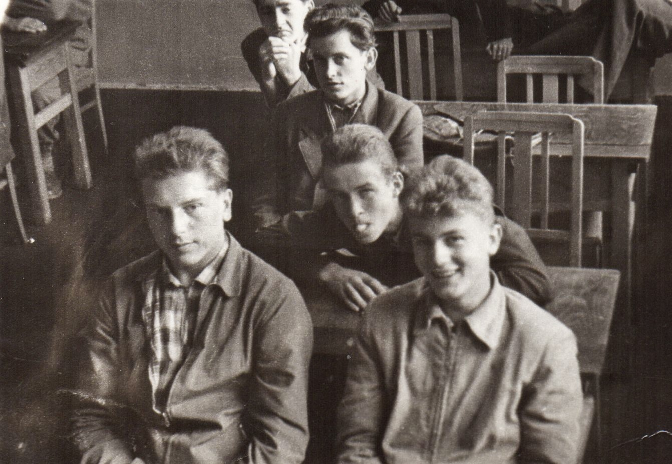 Oberschule Bernburg, Klassenraum (1957)